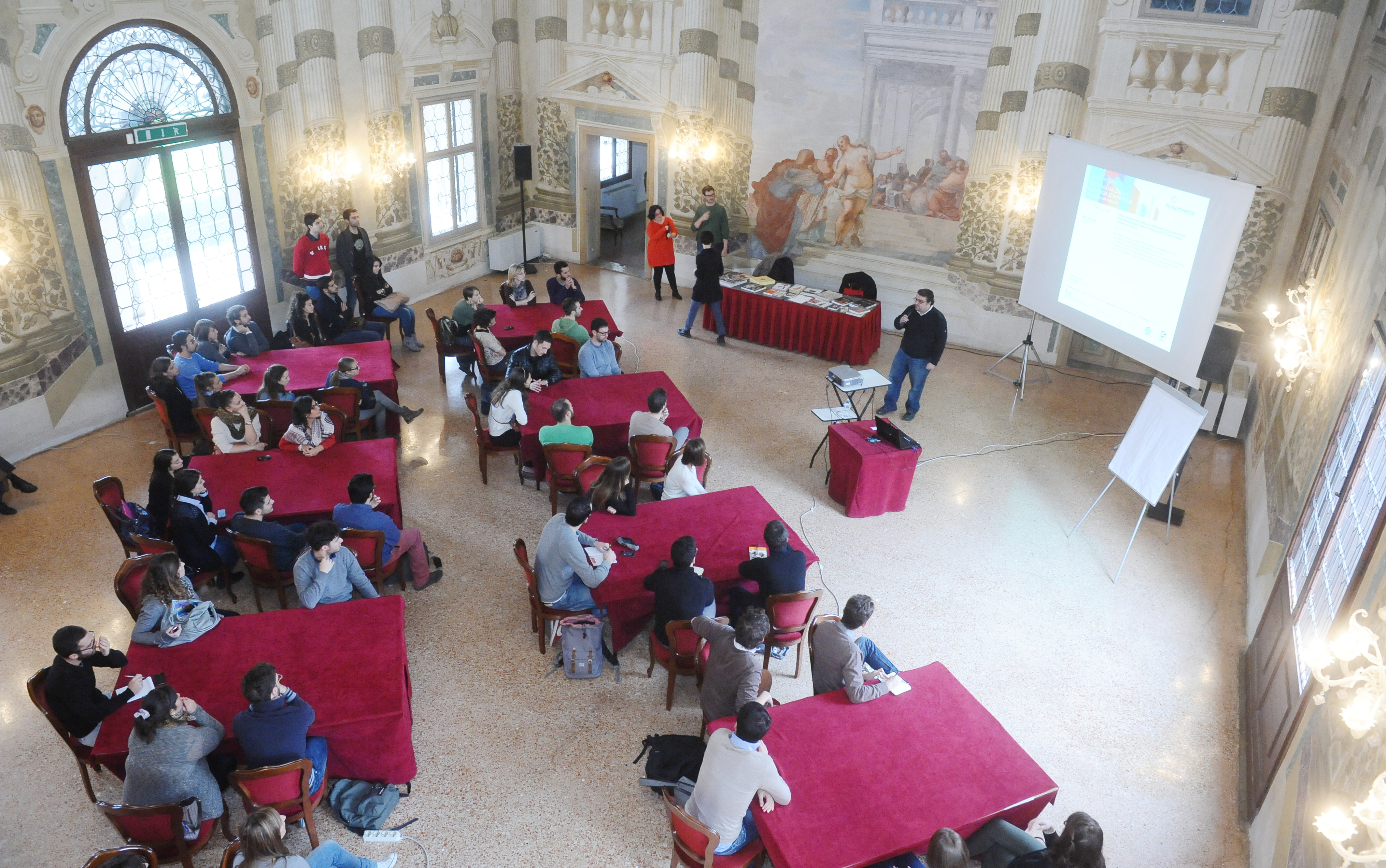 Europeana Fashion Editathon 2013 al Museo Rossimoda della calzatura di Stra.